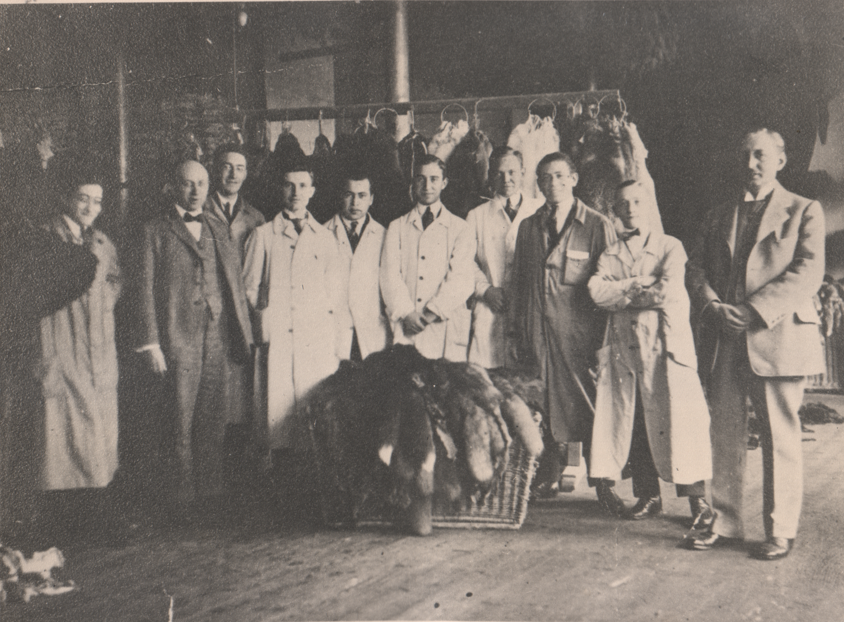 Diverse Pelzhändler, wahrscheinlich in Leipzig, vor einem Korb mit Silberfuchsfellen. Ganz links: Max Ariowitsch ganz rechts: Dr. Herbert Halberstam.